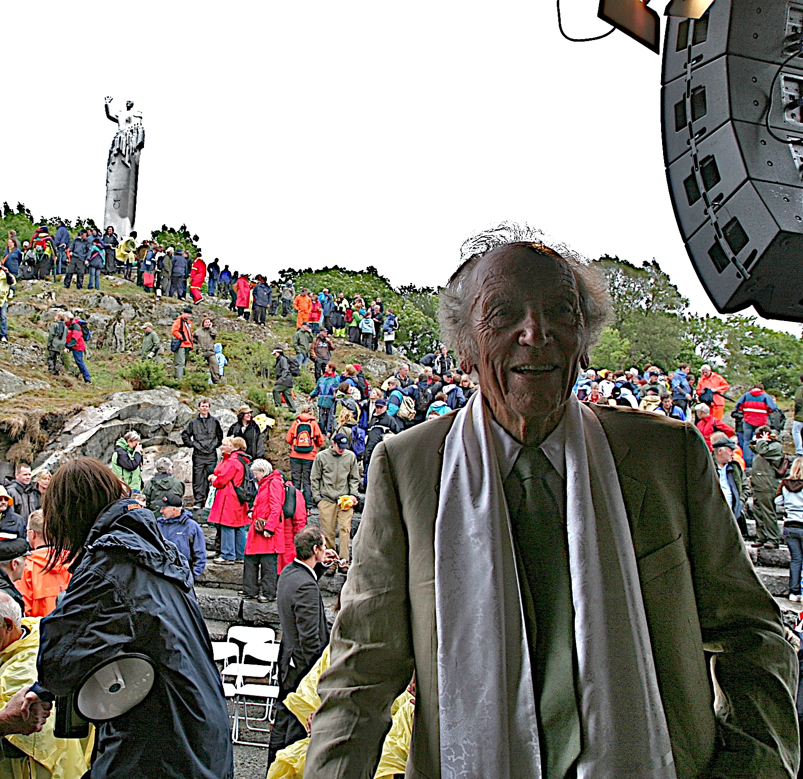 Sculptor Knut Steen in Skjerjehamn Gulen in Norway